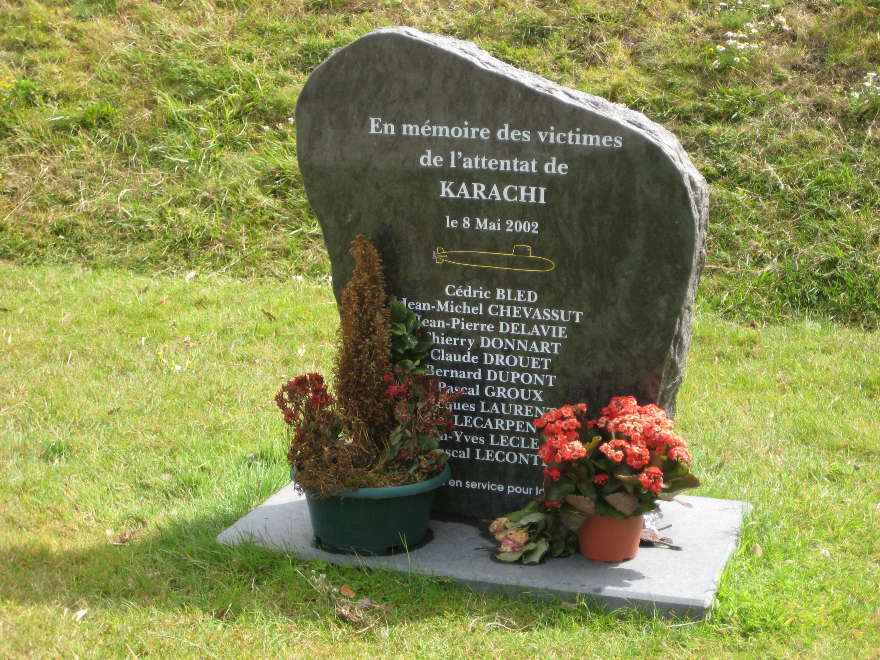 Near Cité de la Mer (Cherbourg), near 'Le Redoutable'. (49.647797,-1.617900)+33m. Stèle à la mémoire des victimes de l'attentat du 8 mai 2002 à Karachi.